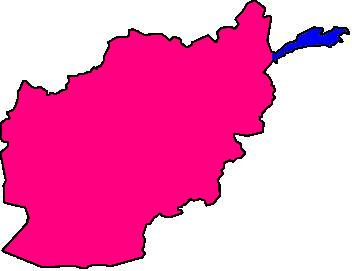 Mappa dell'Afganistan con evidenziato in blu il corridoio del Vacan.